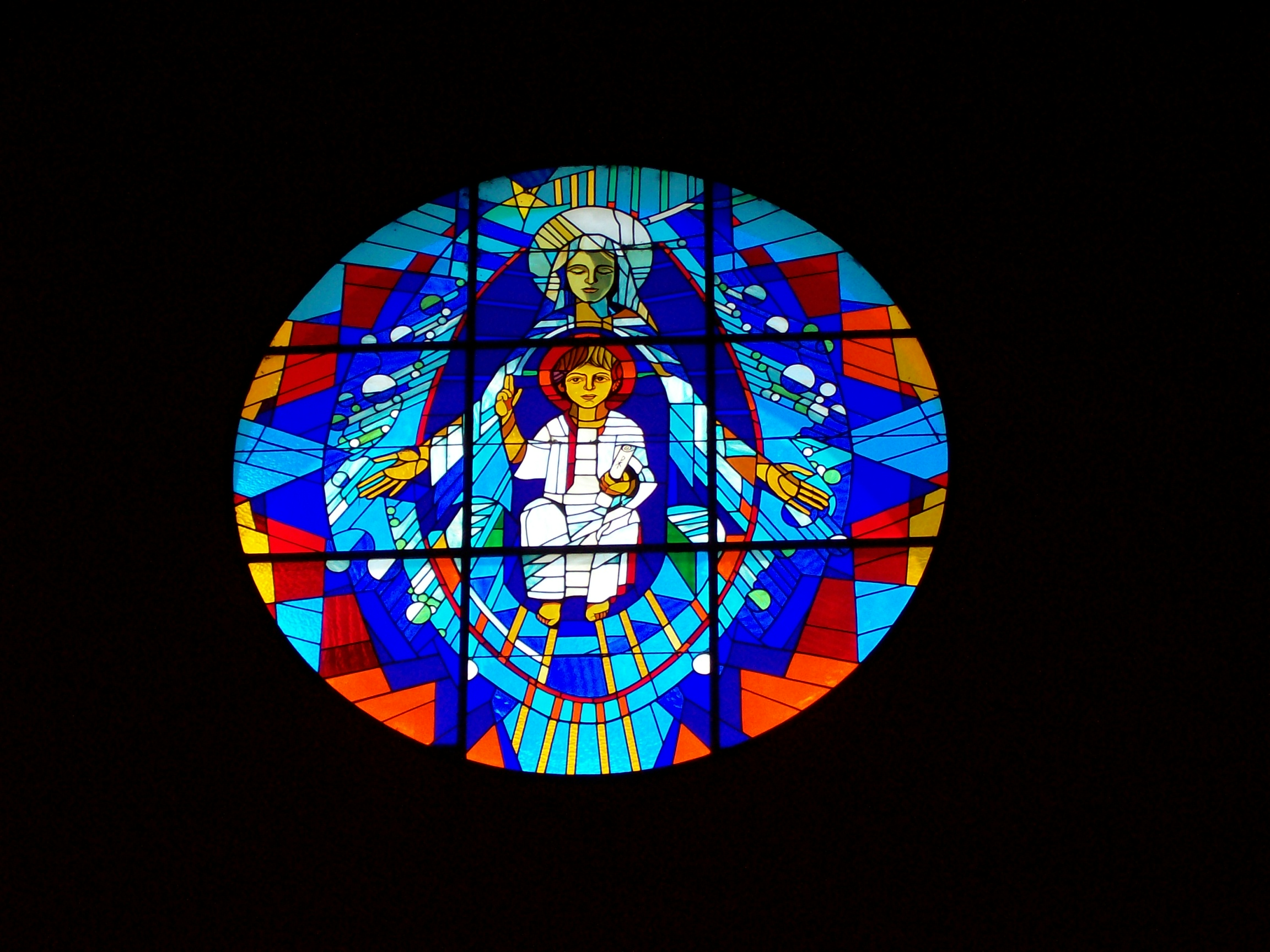 Vitraux at the Abadia Benedictina del Niño Dios, Victoria, Entre Ríos, Argentina.